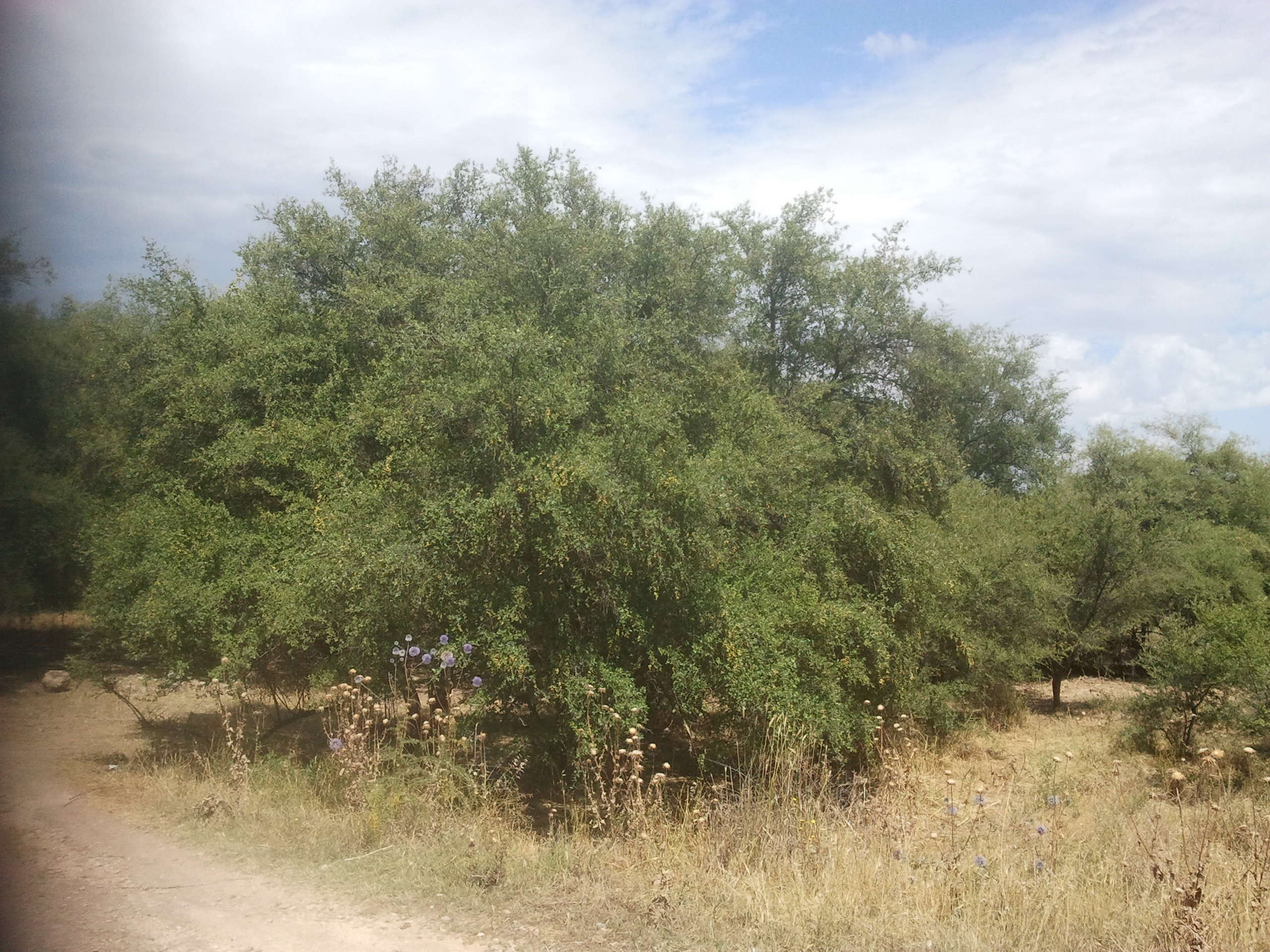 עצי שיזף מצוי בחורשה ליד עין חוקוק בגליל